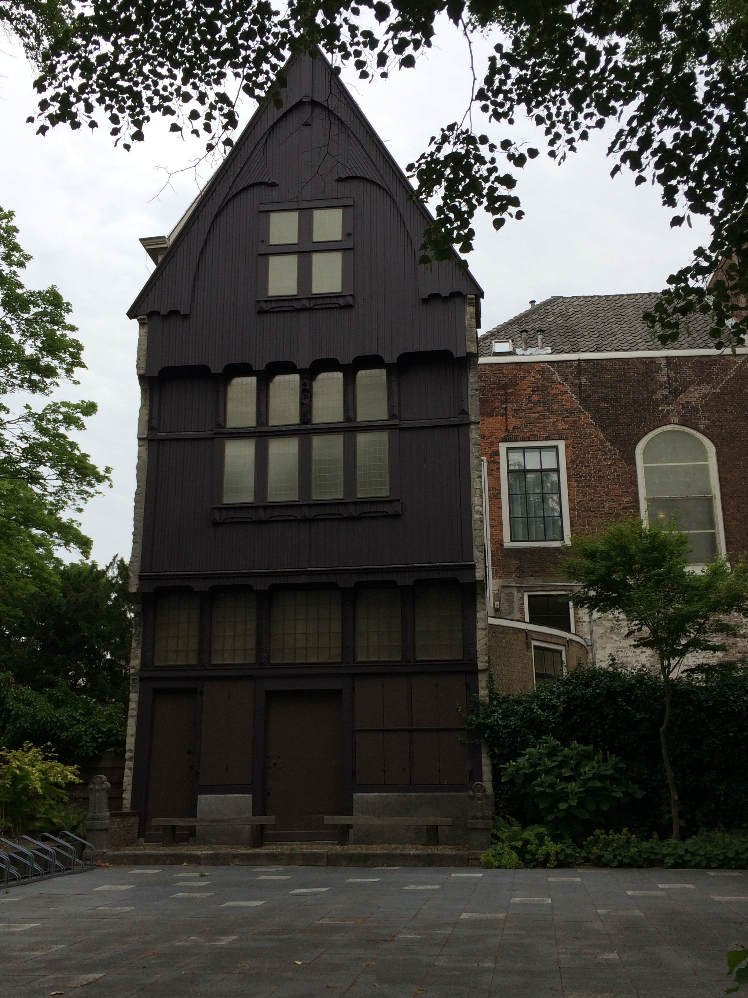 Houten gevel KZGW Achter het Hofplein Middelburg